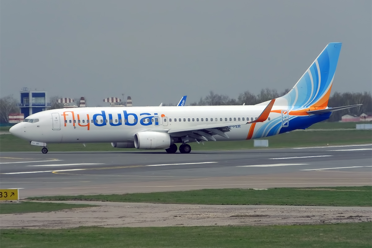 FlyDubai, A6-FER, Boeing 737-8KN